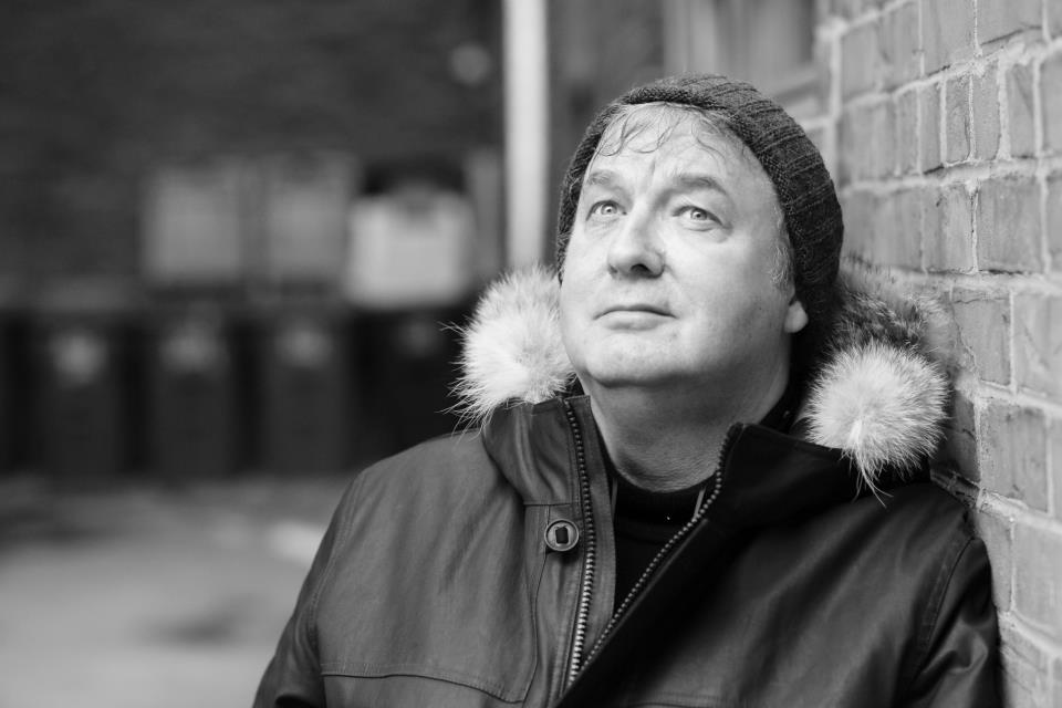 photo Christophe Brachet